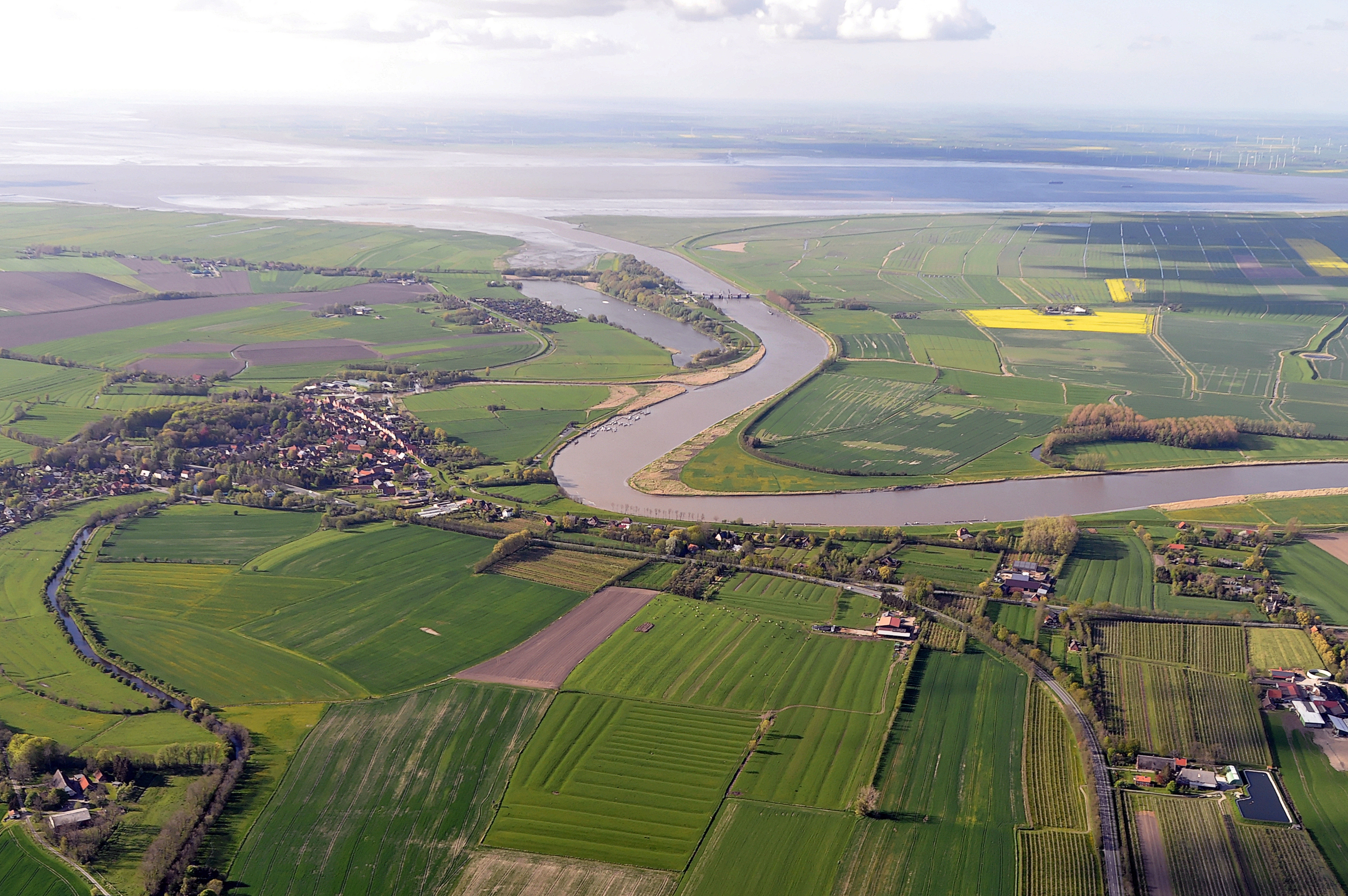 Luftbilder von der Nordseeküste 2012-05